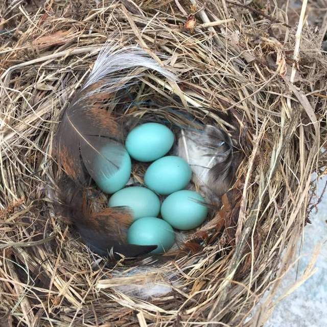 Oeufs de rougequeue à front blanc.